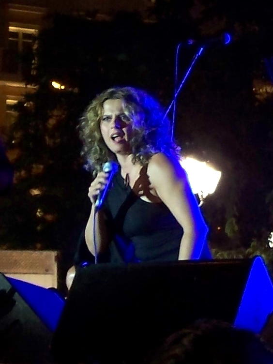 Greek singer Eleni Tsaligopoulou (Ελένη Τσαλιγοπούλου), July 2007.